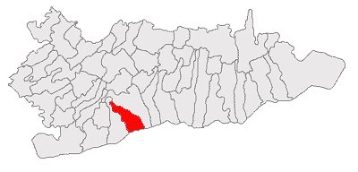 Categorie:Hărţi ale judeţului Călăraşi